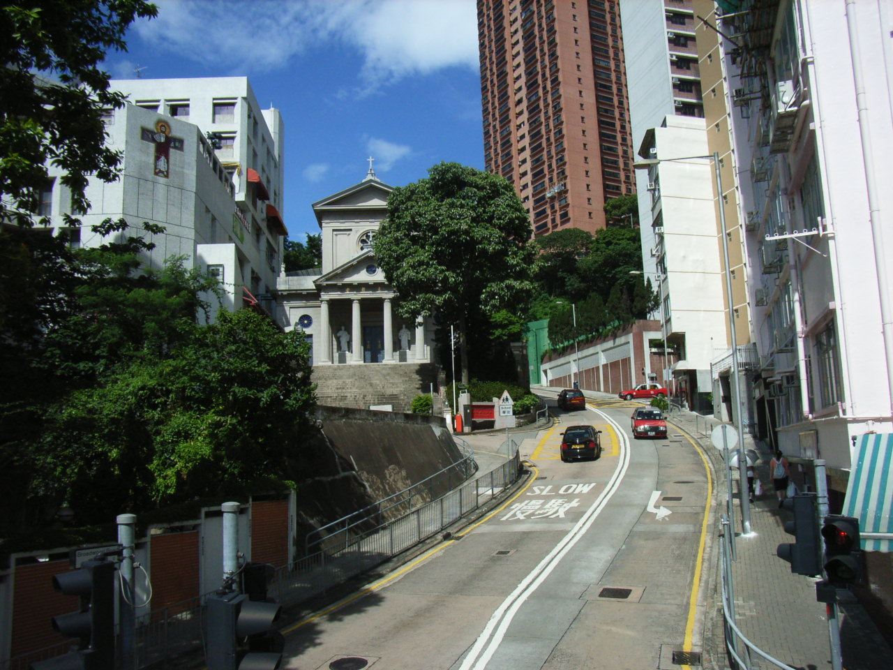 跑馬地黃泥涌道上望, 見樂活道"聖瑪加利大堂". Author: BEVERLYSHEN